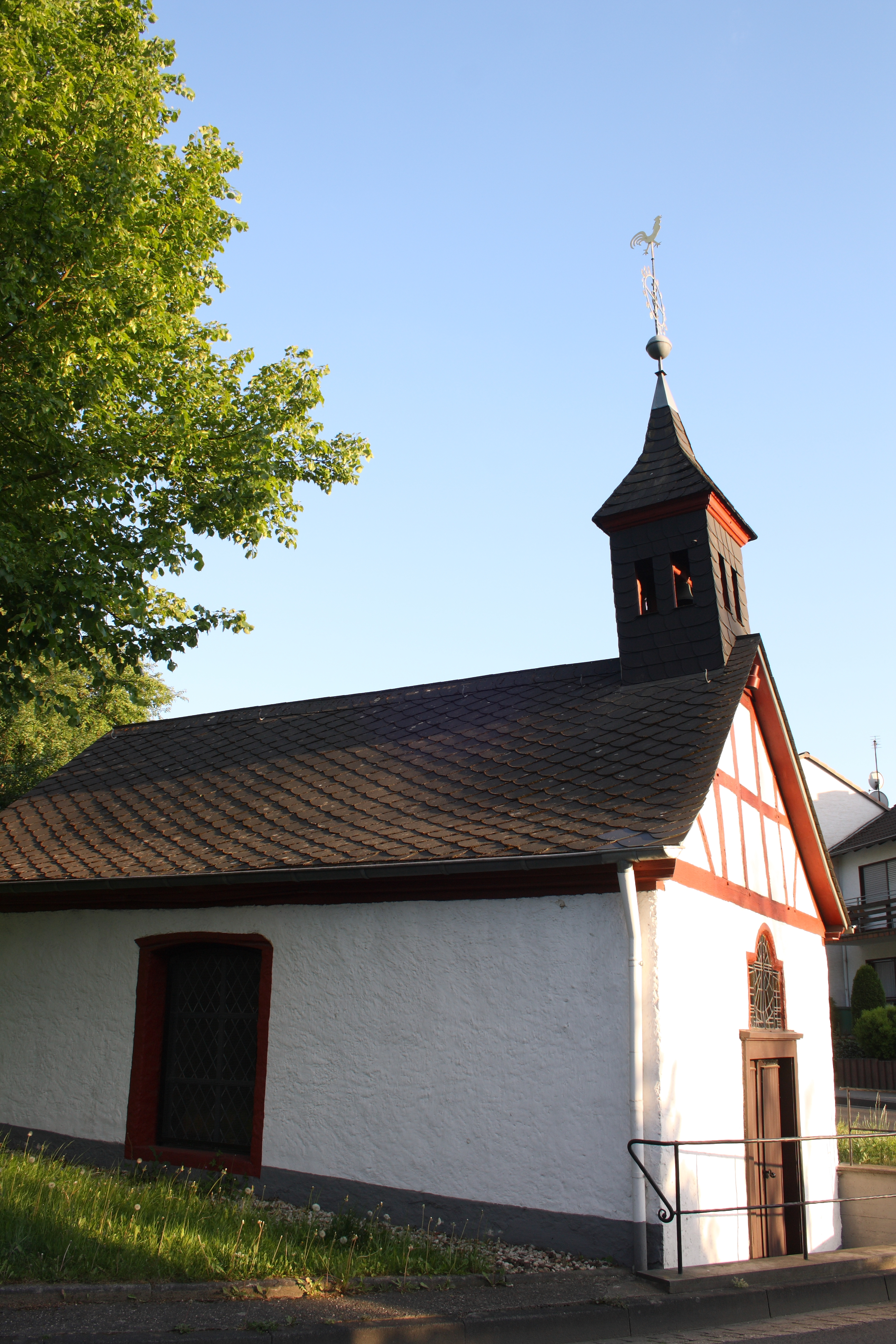 Kapelle St. Michael, sogenannte Buttermarktkapelle in Adenau, Hauptstraße/Ecke Mittelbachstraße